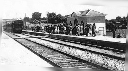 Apeadeiro de Moscavide, ainda com olival na para lá da Rua dos Combatentes da Grande Guerra.